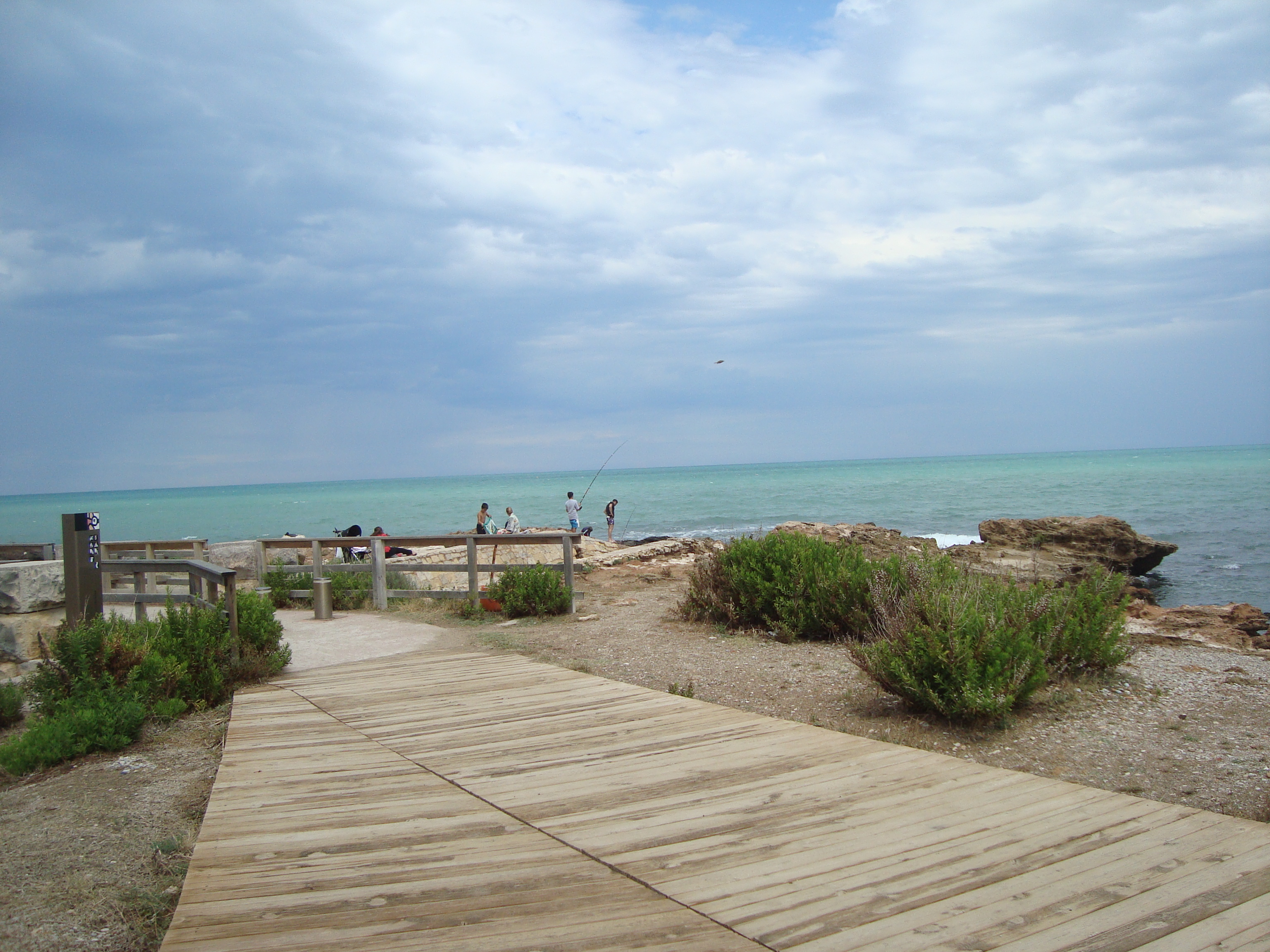 Platges de Torrelasal